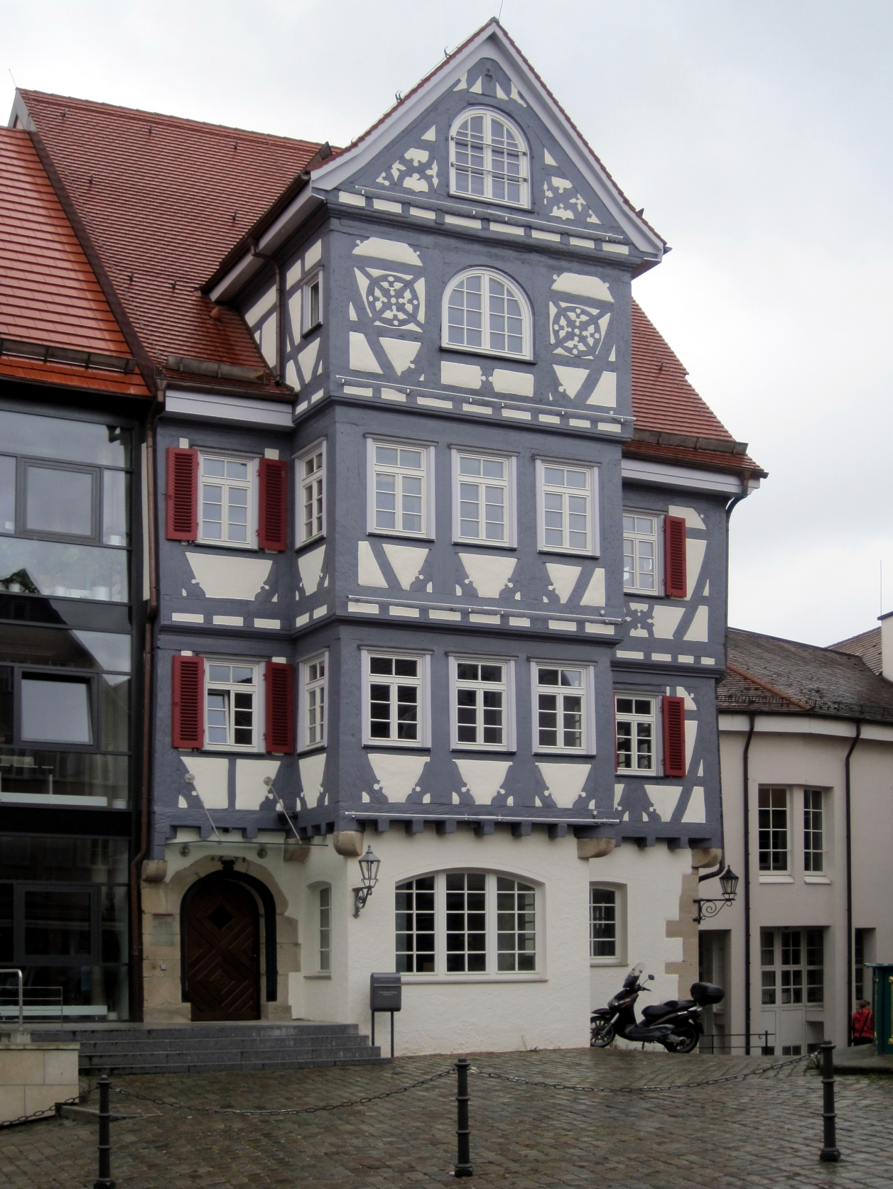 Nürtingen, Gebäude Markstraße 3/5